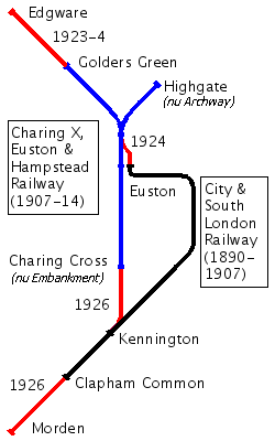 Schematische weergave van de ontwikkeling van de Northern Line van de Londense metro